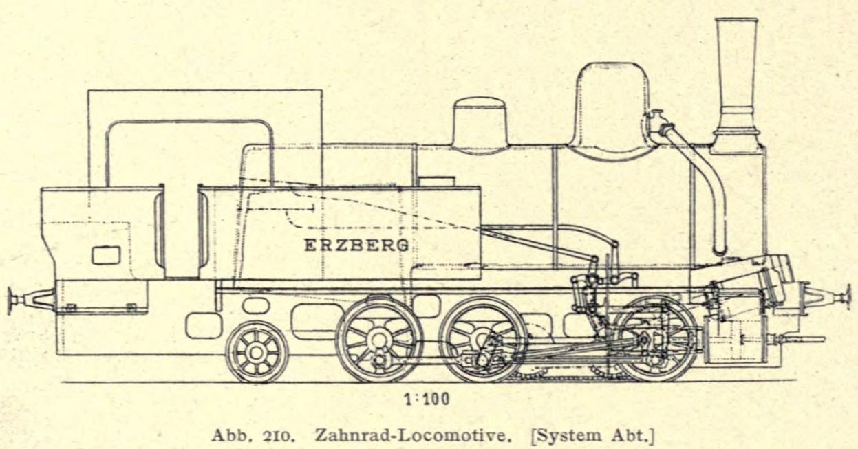 Abb. 210. Zahnrad-Locomotive. [System Abt.] (Erzberg)